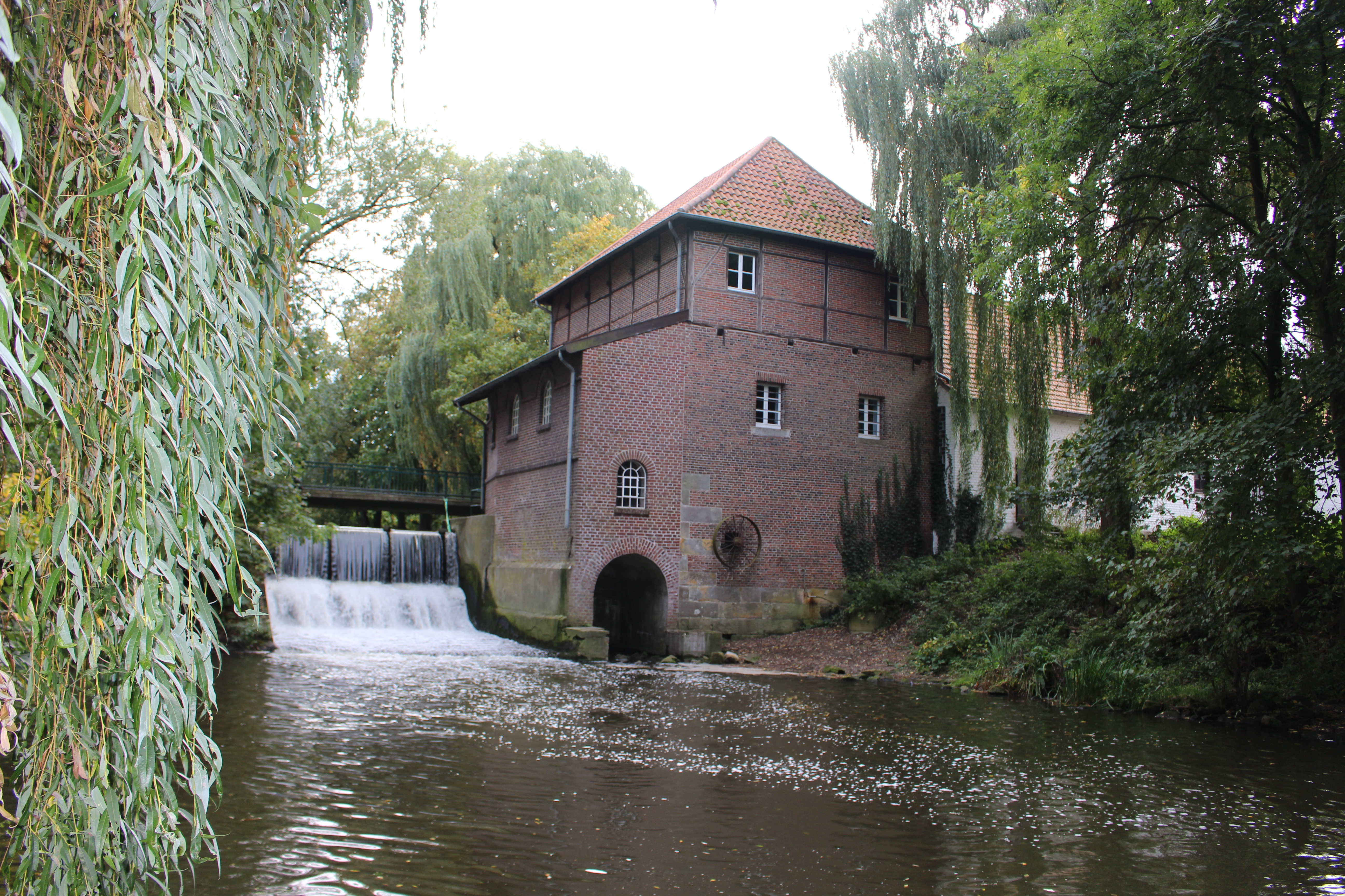 Wassermühle Plagemann, MühlenmuseumThis is a photograph of an architectural monument., no. 3